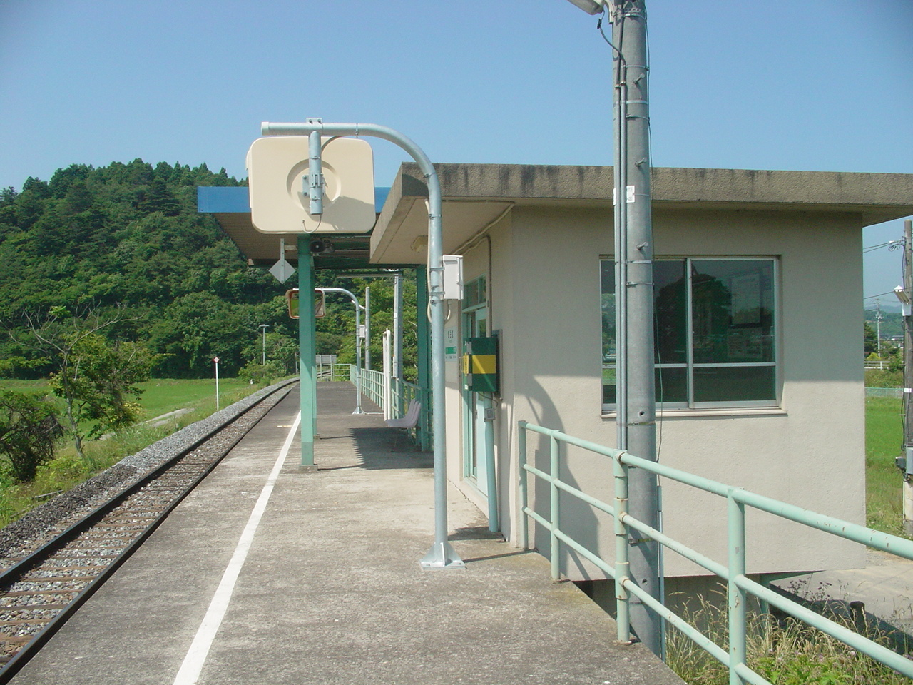 （御岳堂駅）